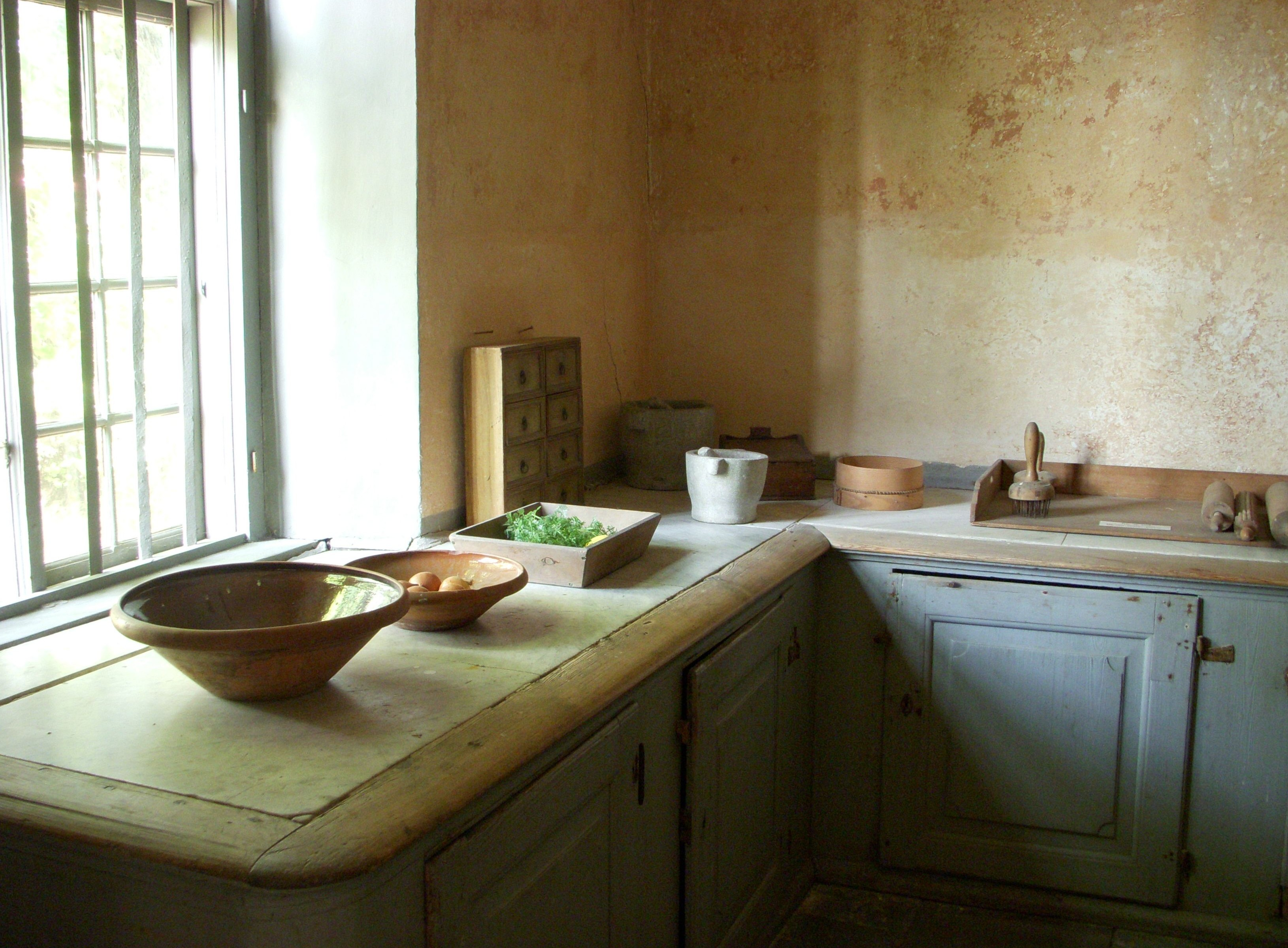 Rokoko-gården Svindersvik i Nacka, köket